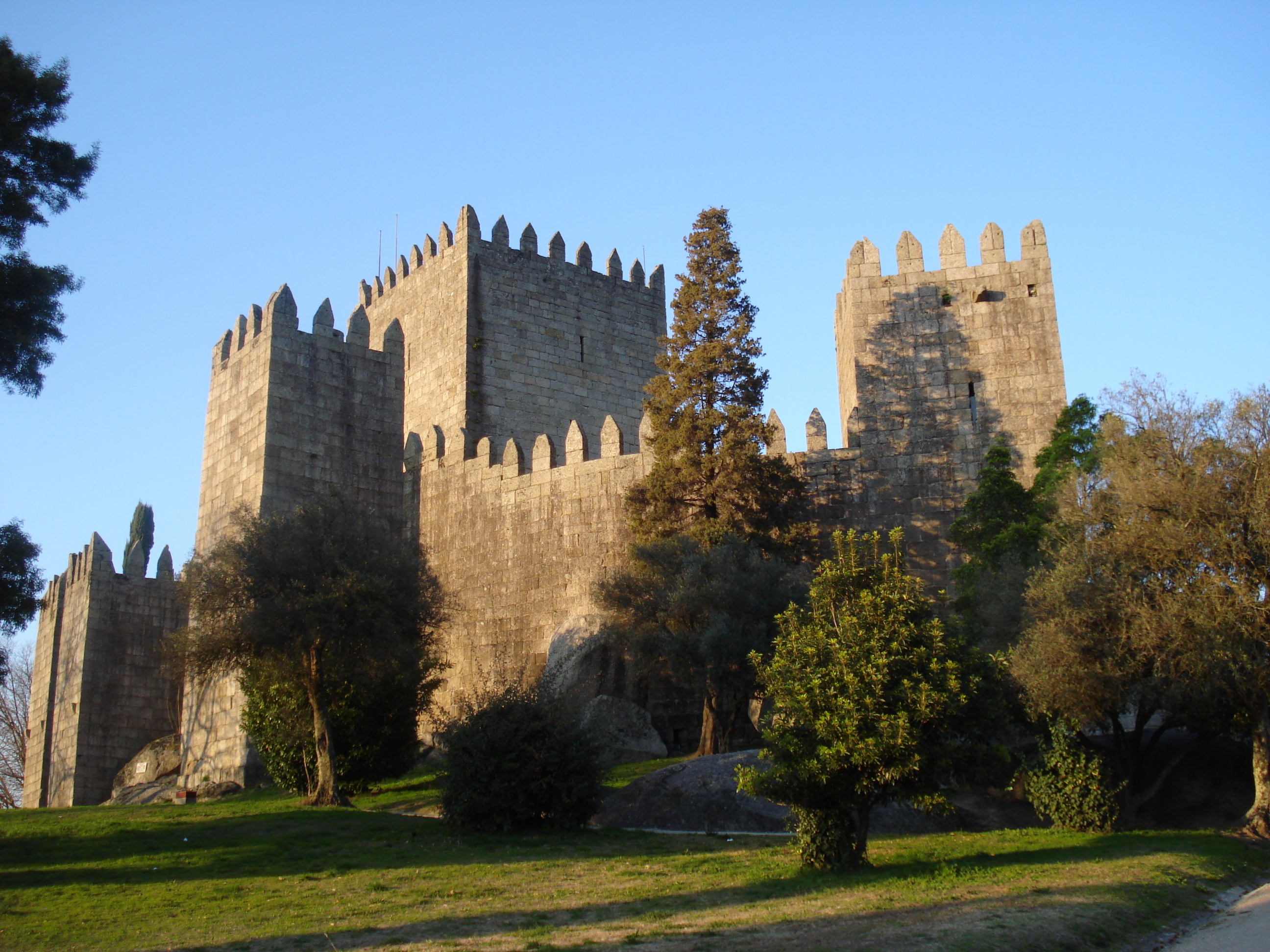 Castelo de Guimarães